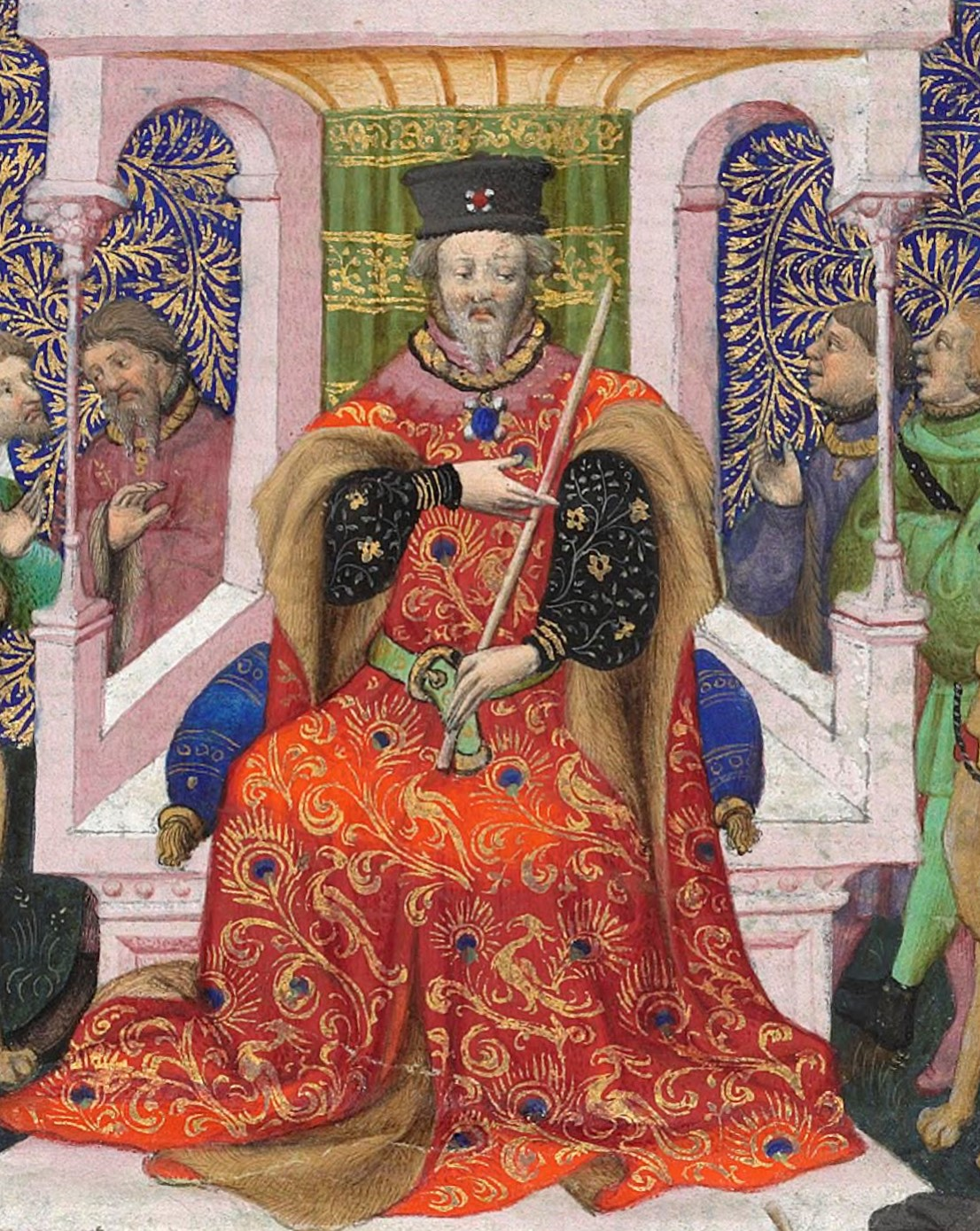 Fébus trône « en majesté » entouré de ses veneurs, page 13 r du Livre de la chasse.